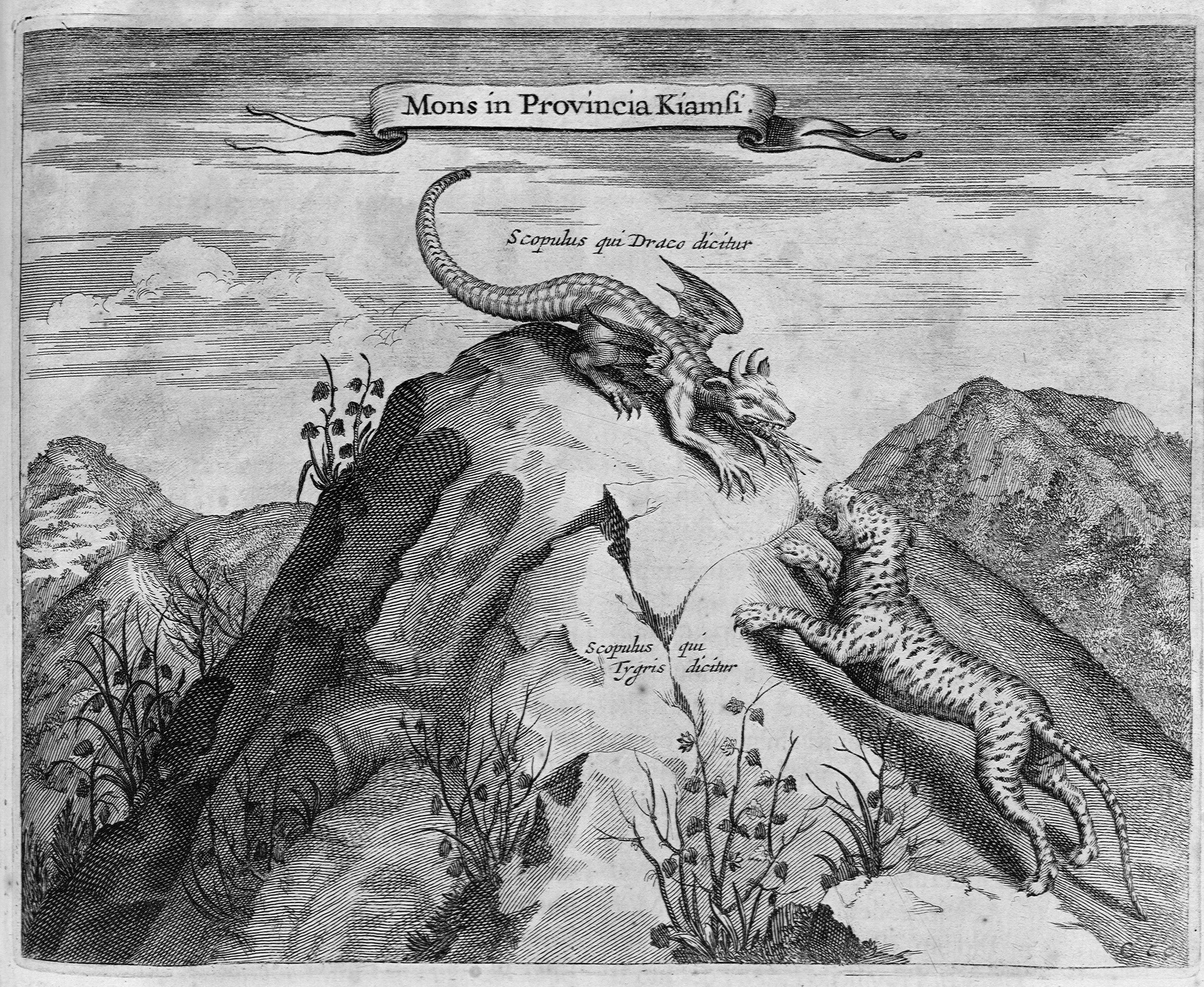 Autor: Kircher, Athanasius, (S.I.), 1602-1680 Descripción bibliográfica: Athanasii Kircheri... China monumentis : qua sacris quà profanis, nec non variis naturae & artis spectaculis, aliarumque rerum memorabilium argumentis illustrata ... - Amstelodami : Apud Joannem Janssonium à Waesberge & Elizeum Weyerstraet, 1667 . - [14], 237, [11] p., 24 lám. de grab., 2 mapas: il.; Fol.- Elenchus librorum a P. Athanasio Kirchero e Societate Jesu editorum (2H4). Al final del mismo: "Juxta exemplar Romae, typis Varesii ..." Materia: China - Descripciones y viajes Notas: Sign.: [Ast.]-2[Ast.]4, A-2H4. - Texto a dos col. - Port. con grab. con anagrama de la Compañía de Jesús . - Precede a la port. lám. de grab. alegórico. Precede al Fol. I retrato grab. del autor. - Las h. de grab. calc., 3 de ellas pleg. (dos mapas e inscripción en caracteres chinos), las 23 restantes son: un retrato del autor, Inscripciones siríacas y sánscritas, personajes y vestimenta mogoles, tártaros y chinos, etc. - Las il. calc. intercaladas en el texto son escenas costumbristas y fauna y flora de China Impresor: Janssonius van Waesberge, Johannes, fl. 1642-1681, imp. Impresor: Weyerstraet, Elisée, imp. Lugar de impresión: Holanda. Amsterdam Localización: Vea la ilustración en su contexto Libro completo en pdf